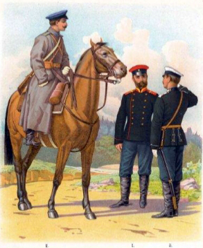 Армейские Драгунские полки. 1) Вахмистр 7-го Драгунского Новороссийского Е.И.В. Великого Князя Владимира Александровича полка 2) Рядовой 8-го Драгунского Смоленского Императора Александра III полка 3) Рядовой 9-го Драгунского Елисаветградского полка ( форма служебная ) ( Приказ по воен. вед. 1897 г. № 47 ).